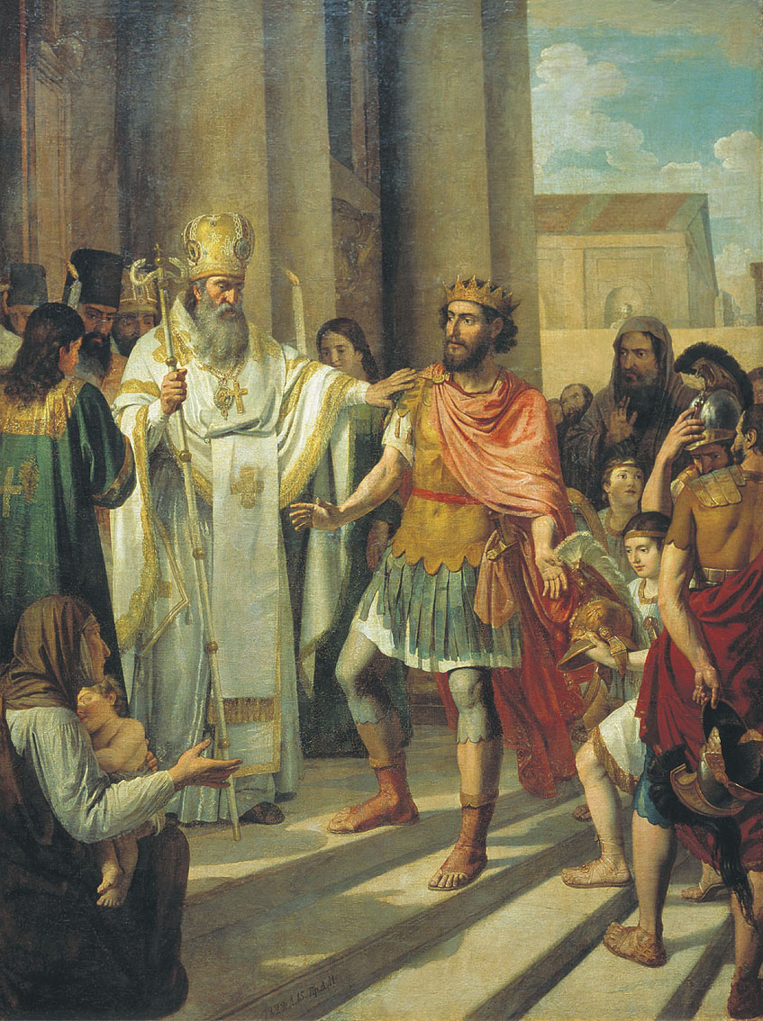 Иванов Андрей Иванович Крещение великого князя Владимира в Корсуни 1829 Материал Холст, масло Размер 211,3 x 158 Собрание Государственная Третьяковская галерея